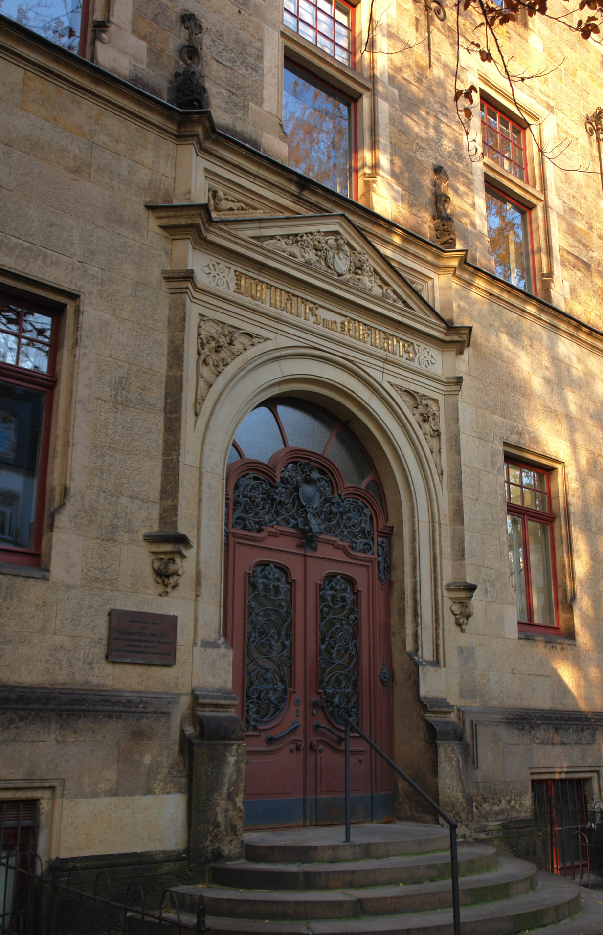 Eingangstür zur Kreuzschule